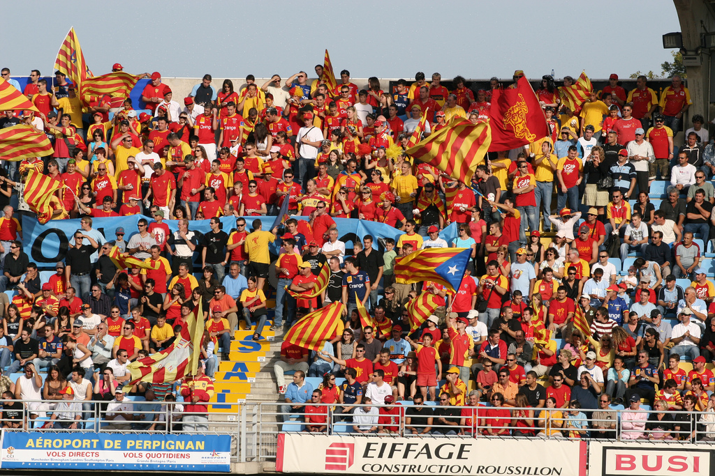 Perpignan Fans. From Flickr